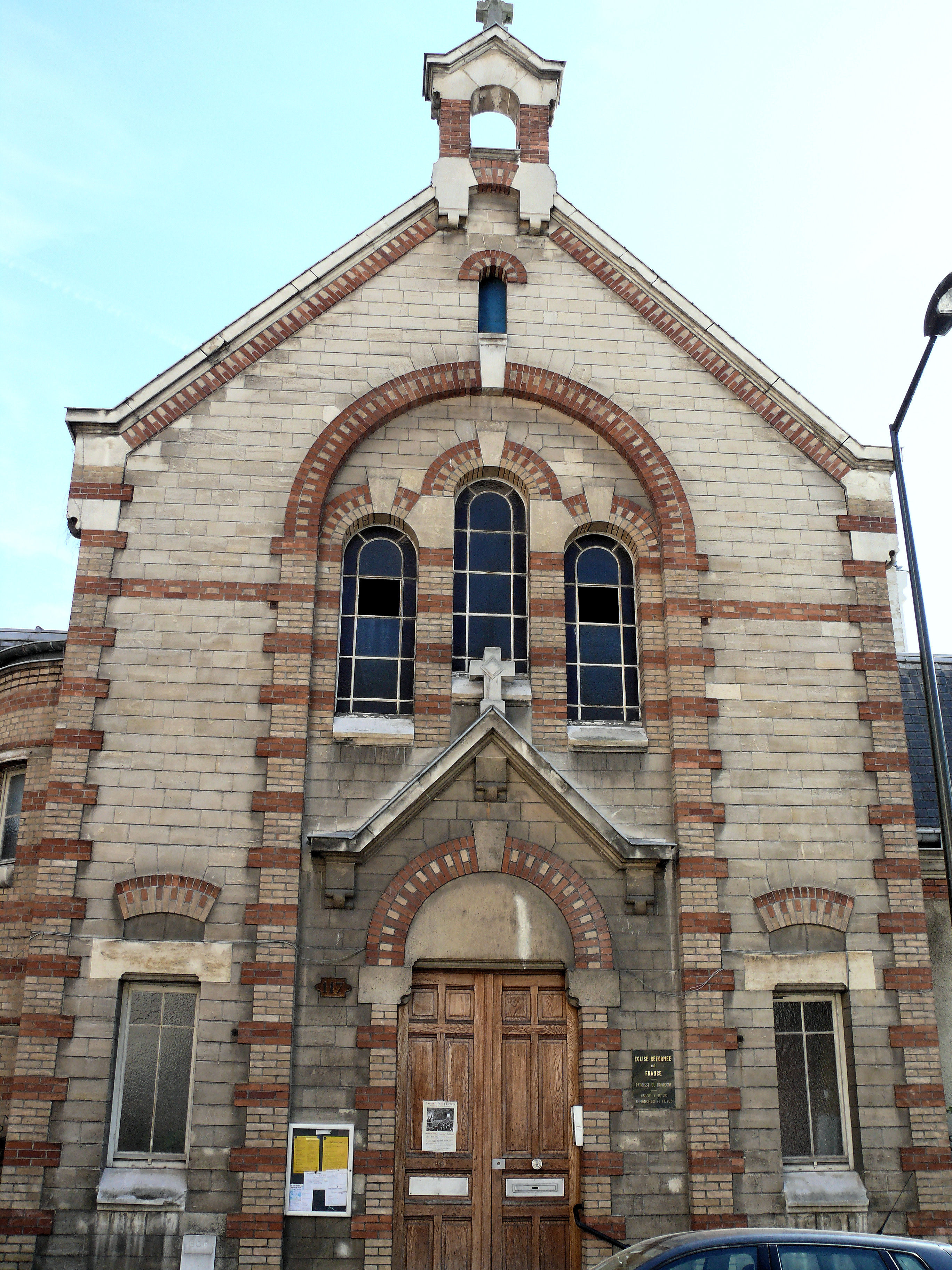 Boulogne-Billancourt (Hauts-de-Seine, France) - Temple de Boulogne de l'Église réformée de France.